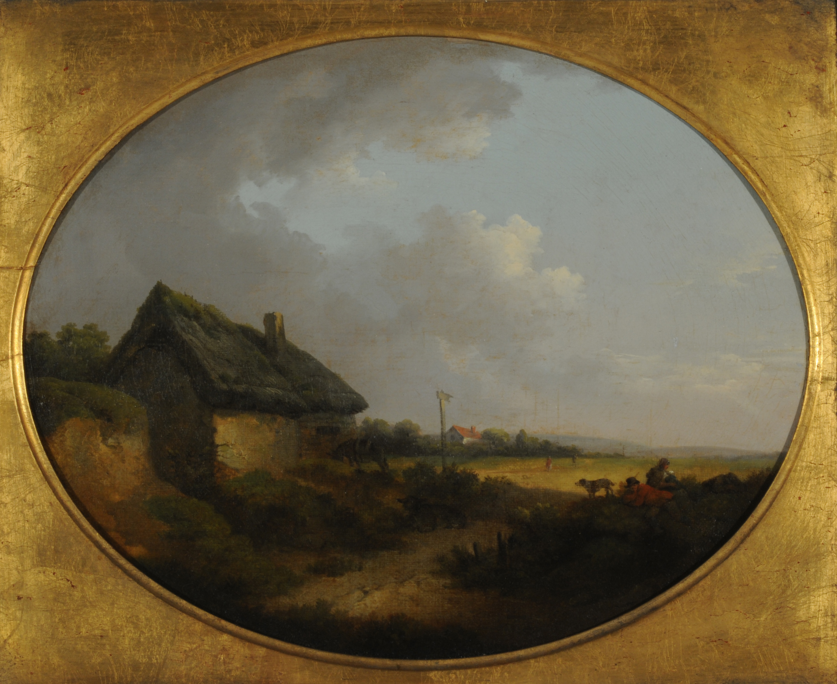 "Paisaje"